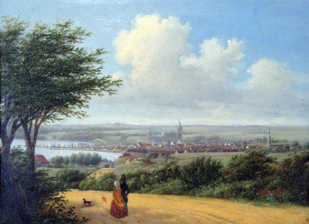 Aarhus set fra bakkerne i Riis Skov, maleri ca. 1850 af Peter Holm (fotograferet 2013 i Den Gamle By). Vejen på maleriet er landevejen til Vejlby, "den famøse hulvej".